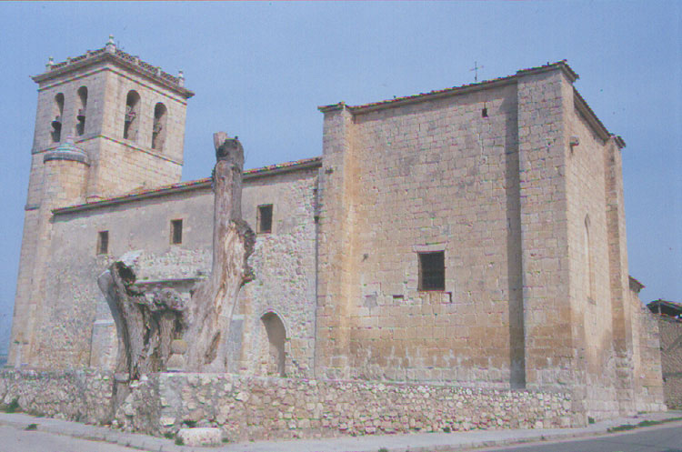 Iglesia de San Martín de Tours - Cogeces de Íscar (Valladolid) - Diapositiva 48 x 48 Color